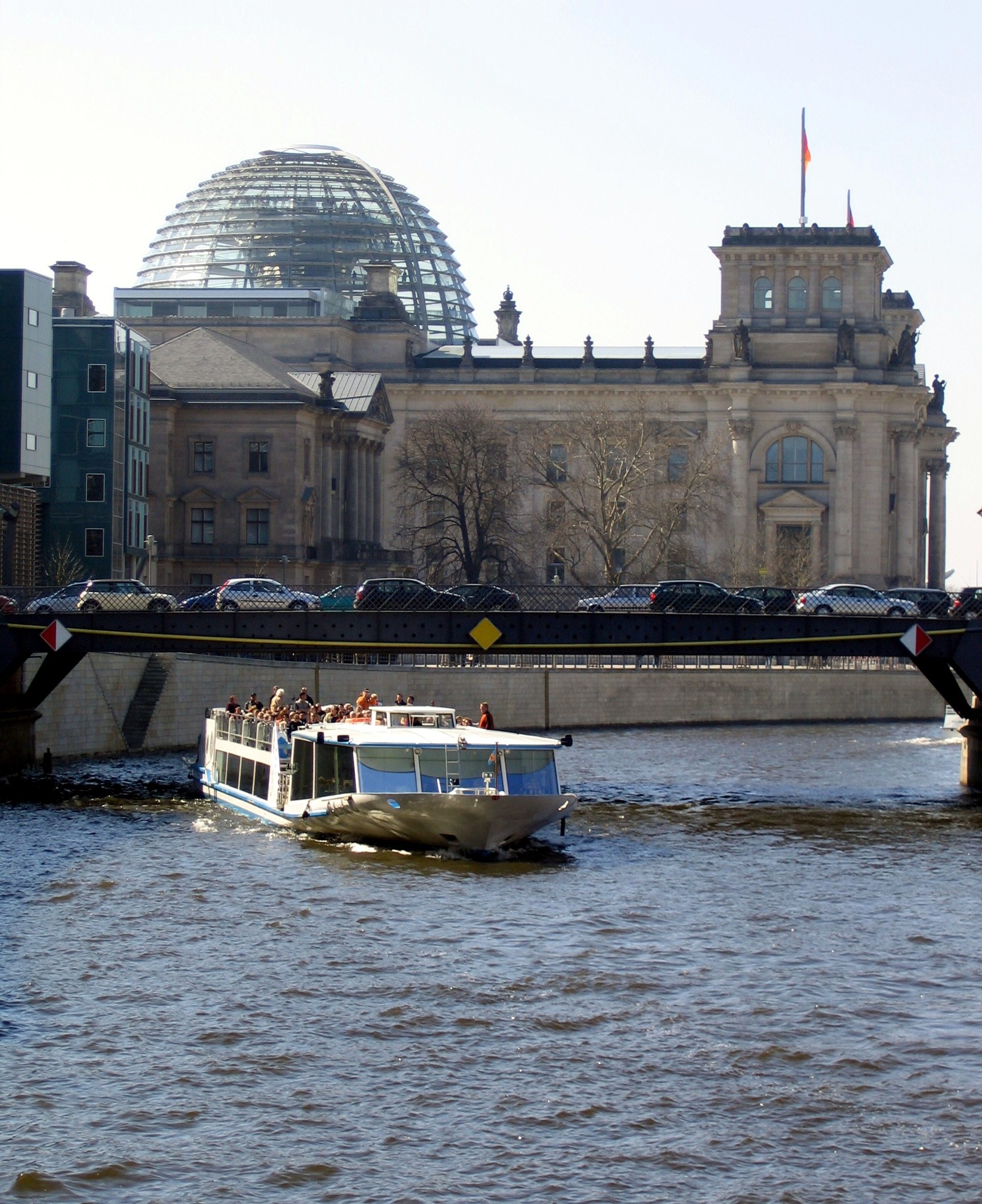 Reichtagsufer Berlin, Spree. Camera: Canon Powershot A95